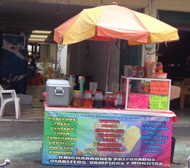 Esta es una micro empresa que se dedica a comercializar eskimos entre otros productos